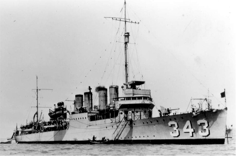 USS Noa (DD-343).